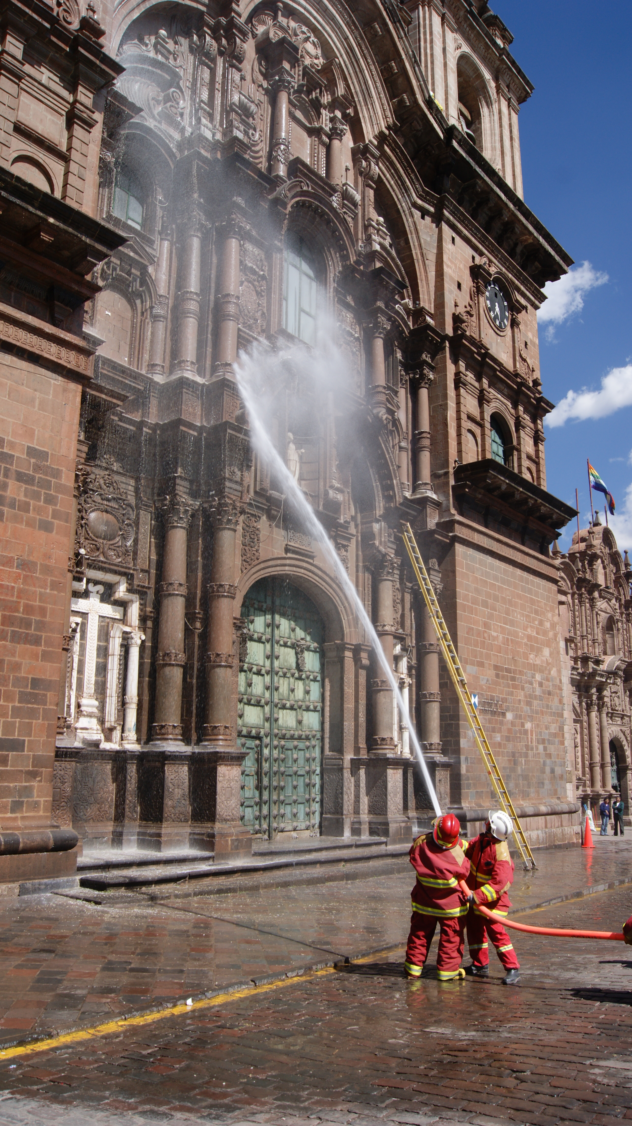 Lavado de la fachada de la Iglesia La Compañía en la ciudad del Cusco